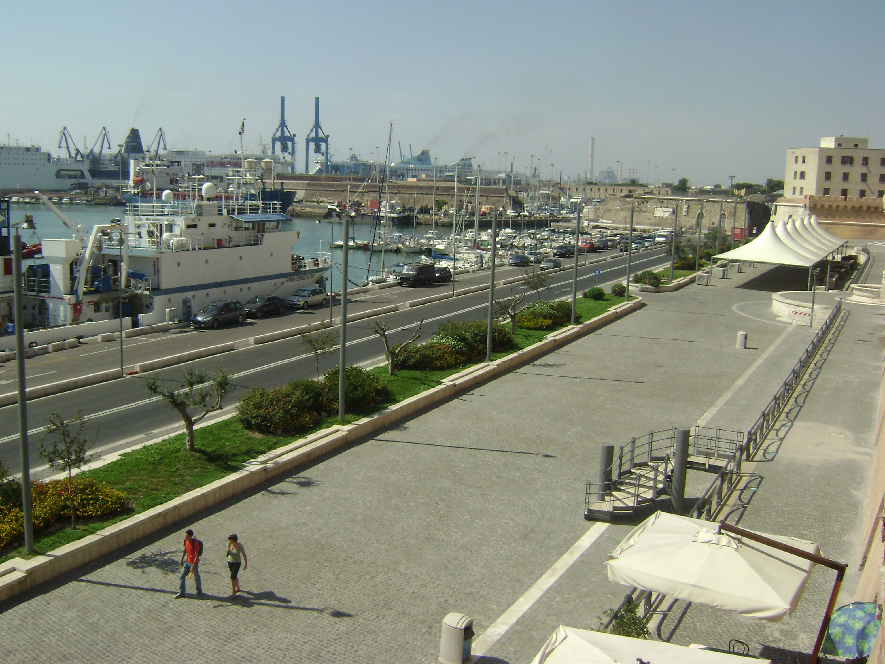 passeggiata nel porto antico di civitavecchia